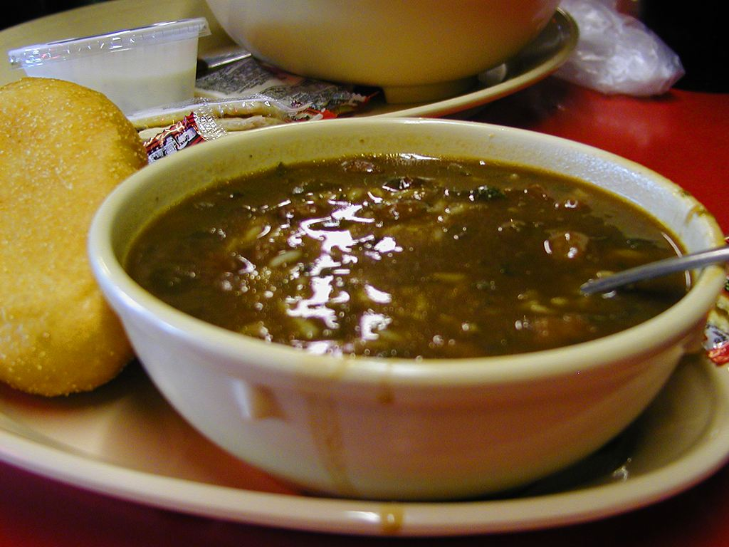 Gombo al estilo de Luisiana